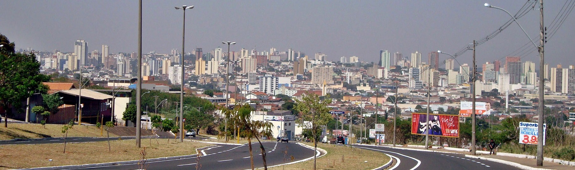 Descendo a Janio Quadros...